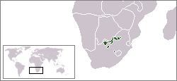 Description:Carte de localisation du Bophuthatswana, Afrique du Sud Auteur:Rémih